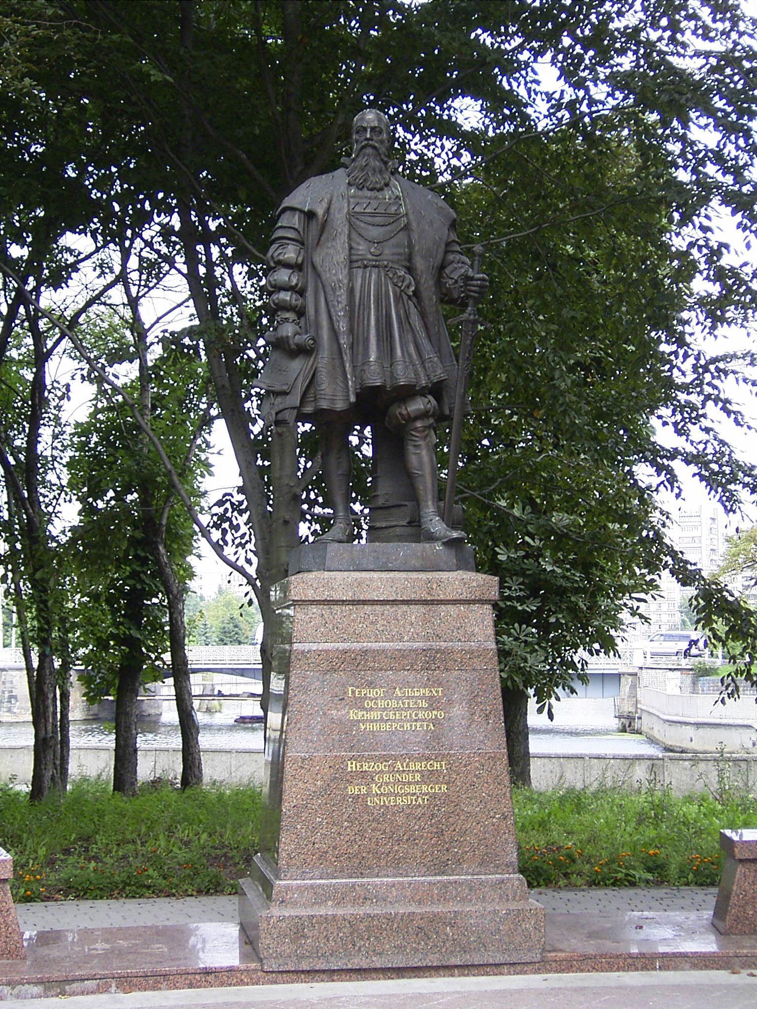 Albrecht von Preussen in Königsberg 2005, nach dem Original von Friedrich Reusch